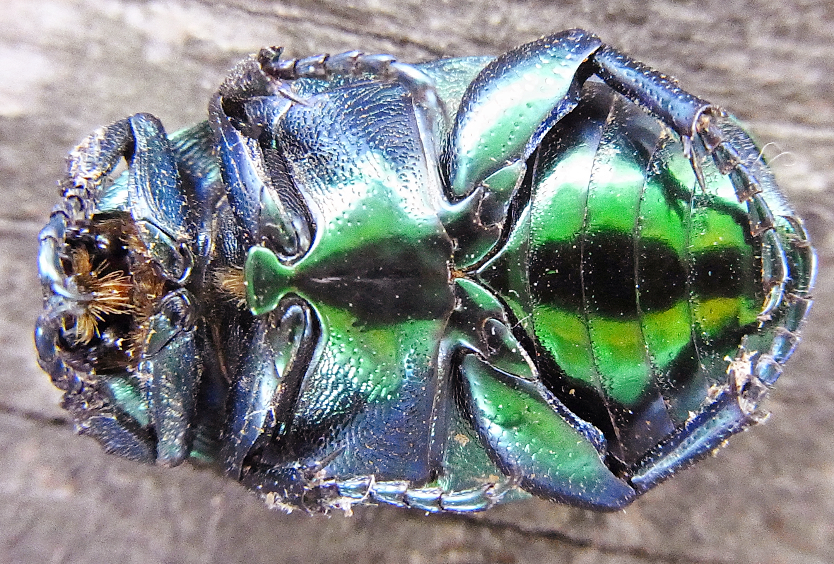 Protaetia affinis aus Ungarn, Nordausläufer des Zemplen-Berglands bei Erdöbénye, Unterseite